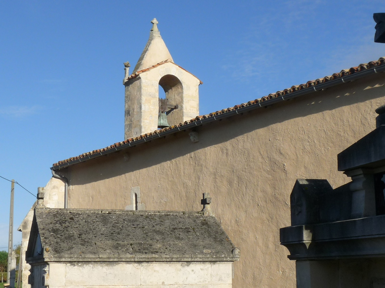 Template:FrEglise du Pin, Charente-Maritime, France